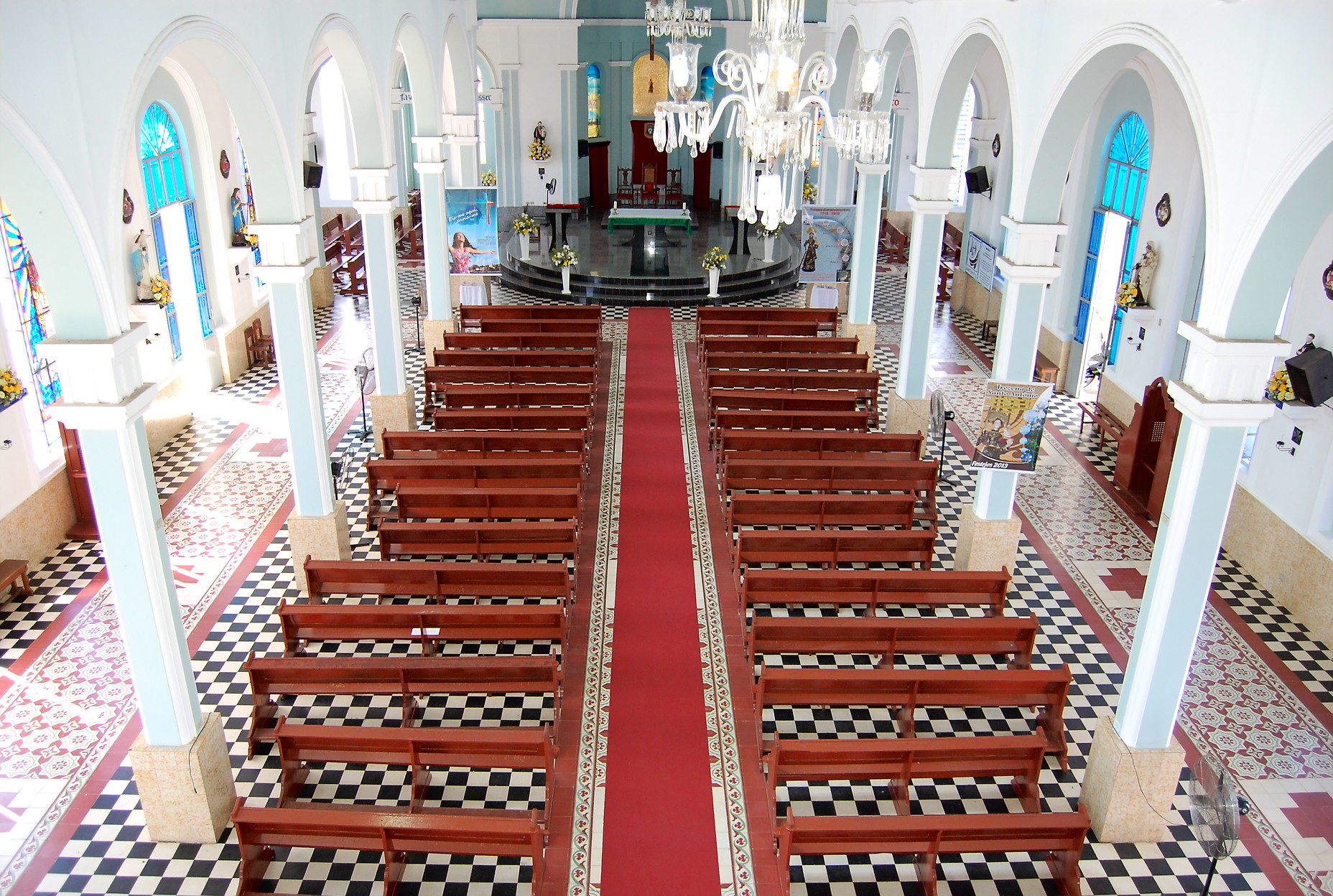 Imagen interna da Catedral de Santo Antônio, da Diocese de Campo Maior-PI.